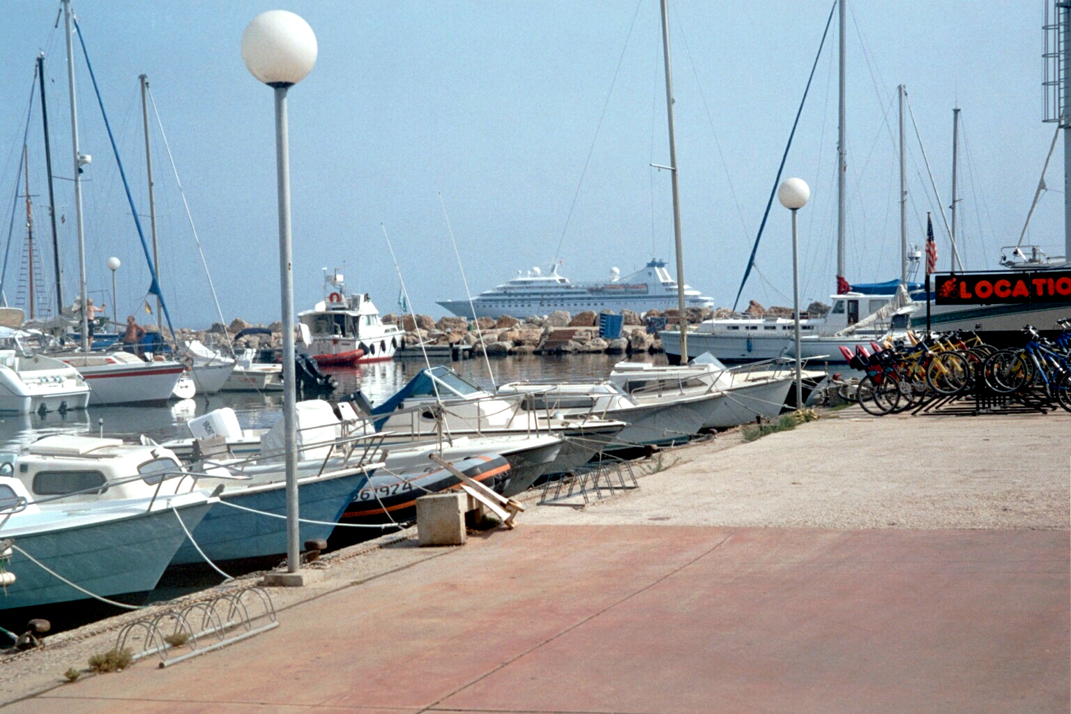 Hafen vu Porquerolles